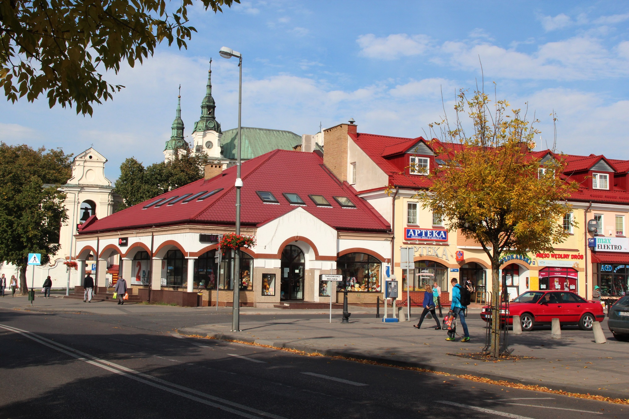 Lubartów, układ urbanistyczny miasta, XVI, XVIII